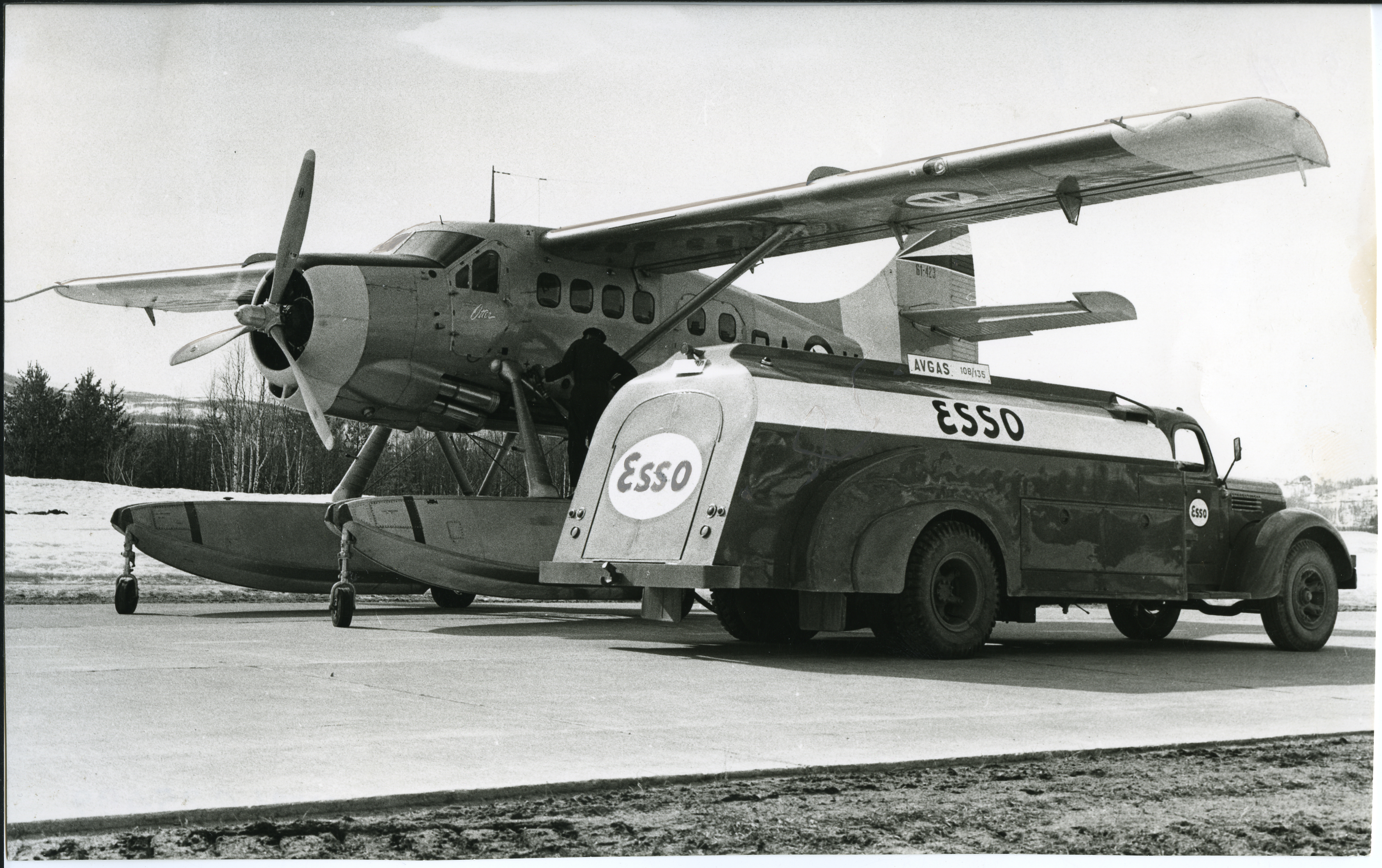 Esso tankbil og DHC-3 sjøfly, Bardufoss flyplass.